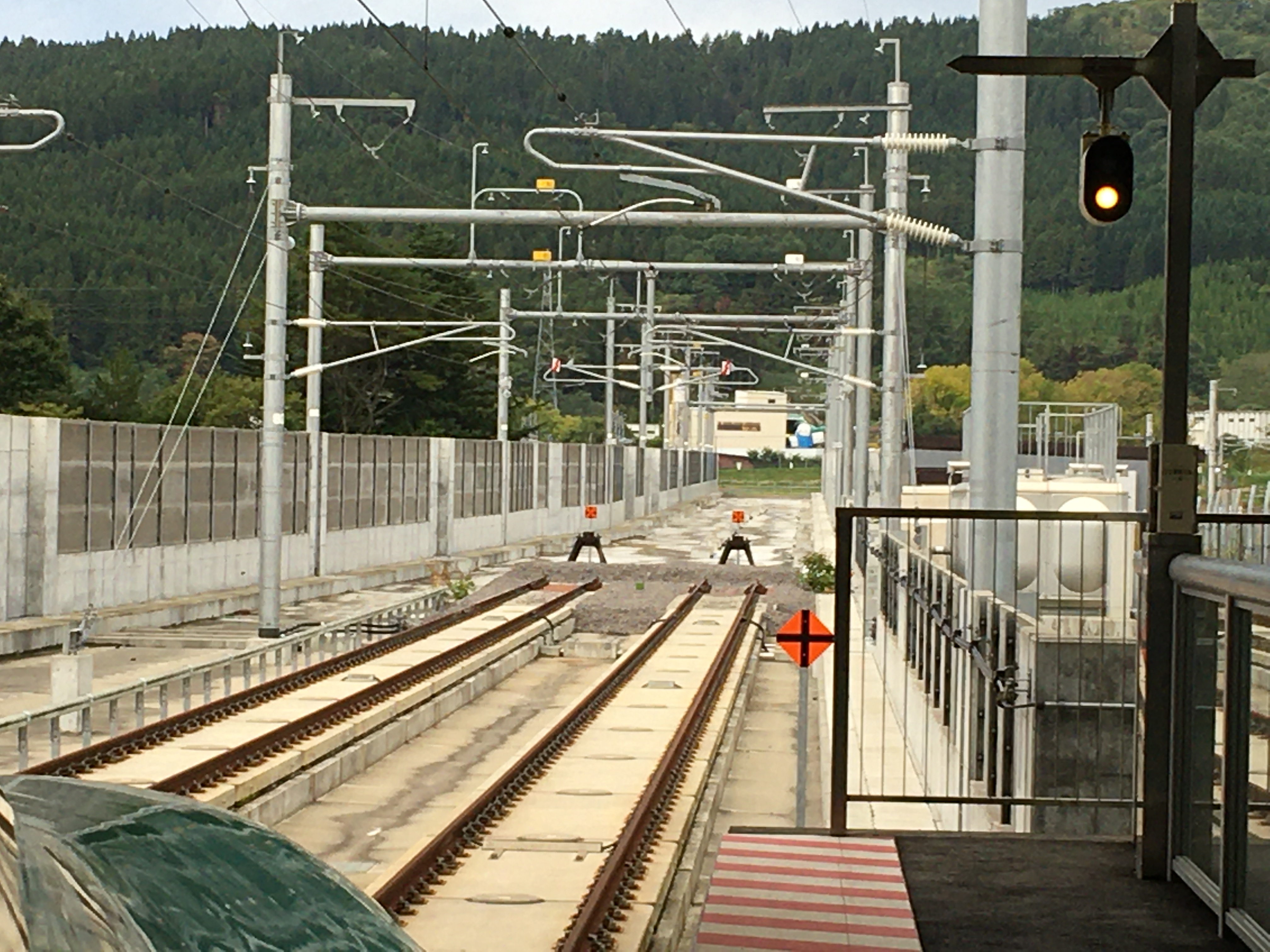 列車止めがあり、その先は工事中となっている。写真中央部、高架橋の奥に見えるのが建設中の渡島トンネル。